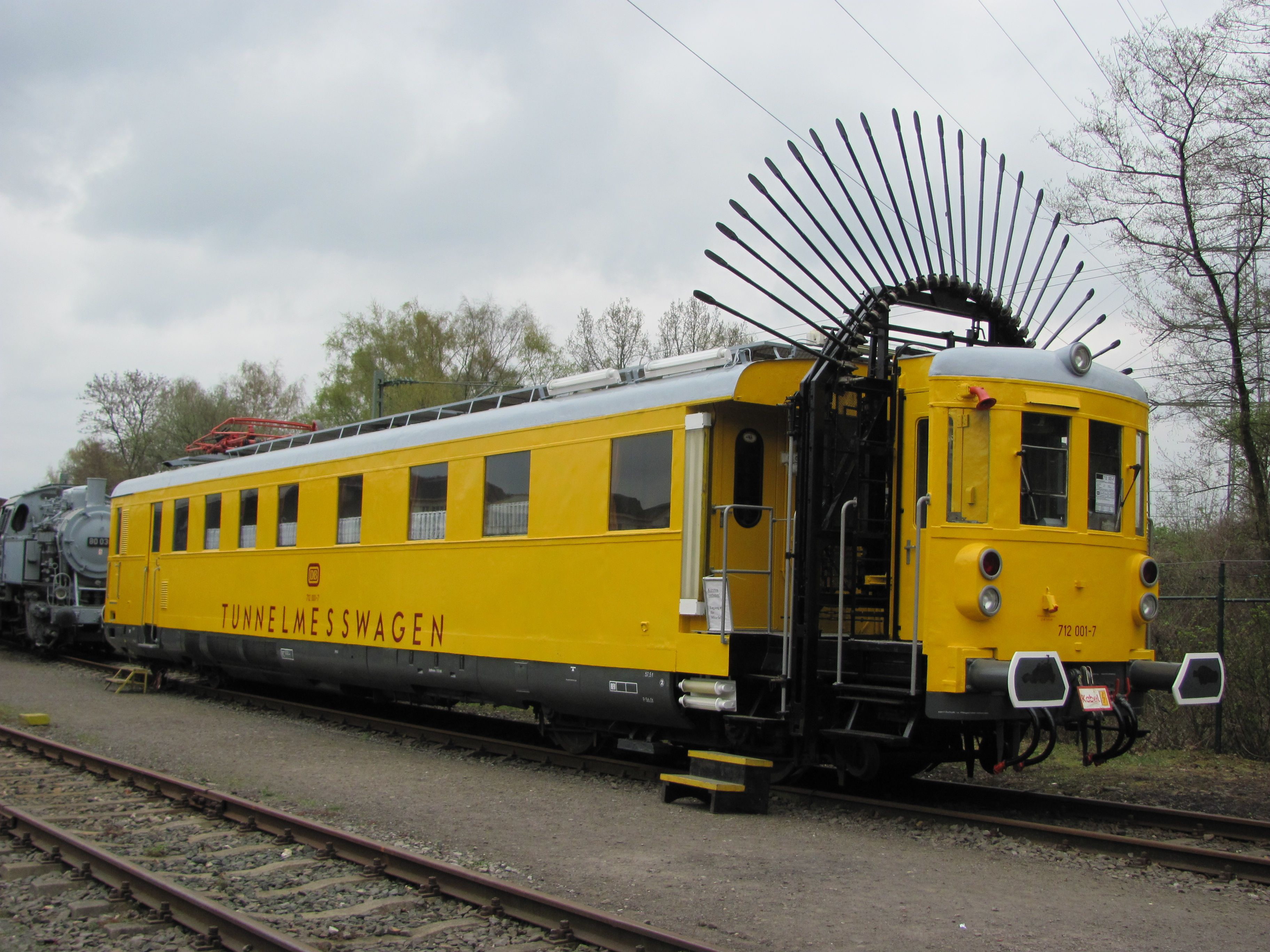 Tunnelmesswagen der Baureihe 712